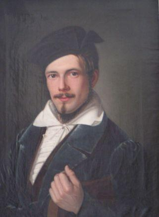 Der Schaumburg-Lippische Minister Viktor von Strauß und Torney (1809-1899)